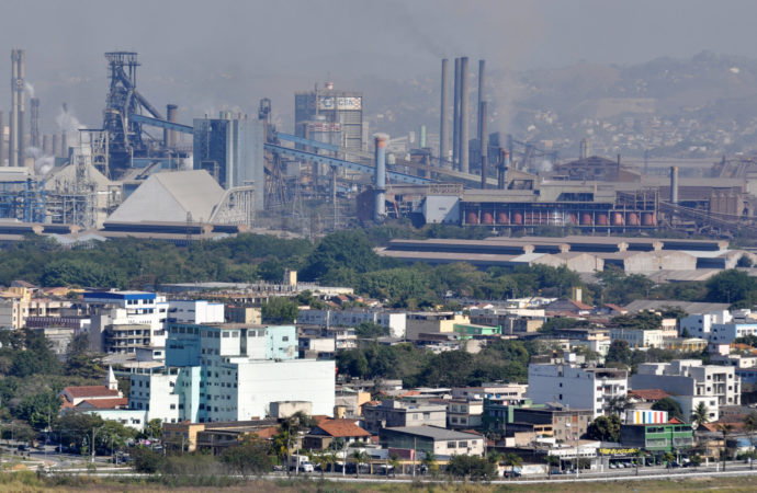 Vista panorâmica do Centro da cidade de Volta Redonda, Rio de Janeiro, Brasil.